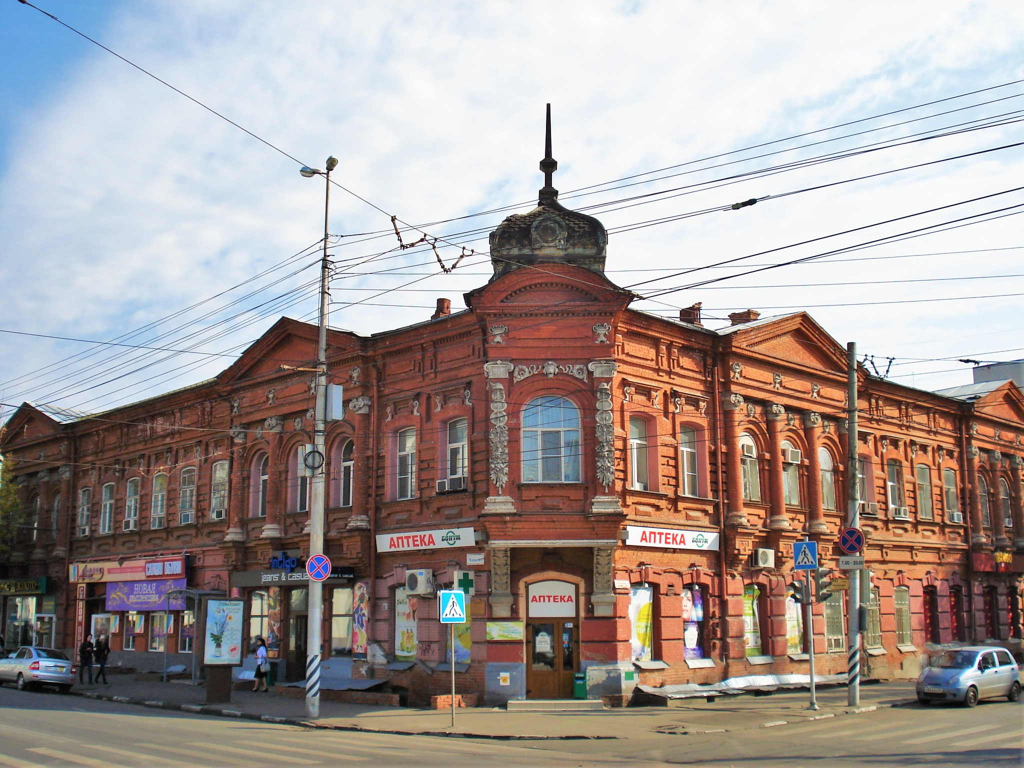 Здание аптеки и магазина Фридолина А.Г.: улица Чапаева, 60 (угол ул. Сакко и Ванцетти, 64), Саратов, Саратовская область. 1910-е гг. арх. Терликов Ю.Н. В советские времена и до настоящего времени в здании располагается аптека.